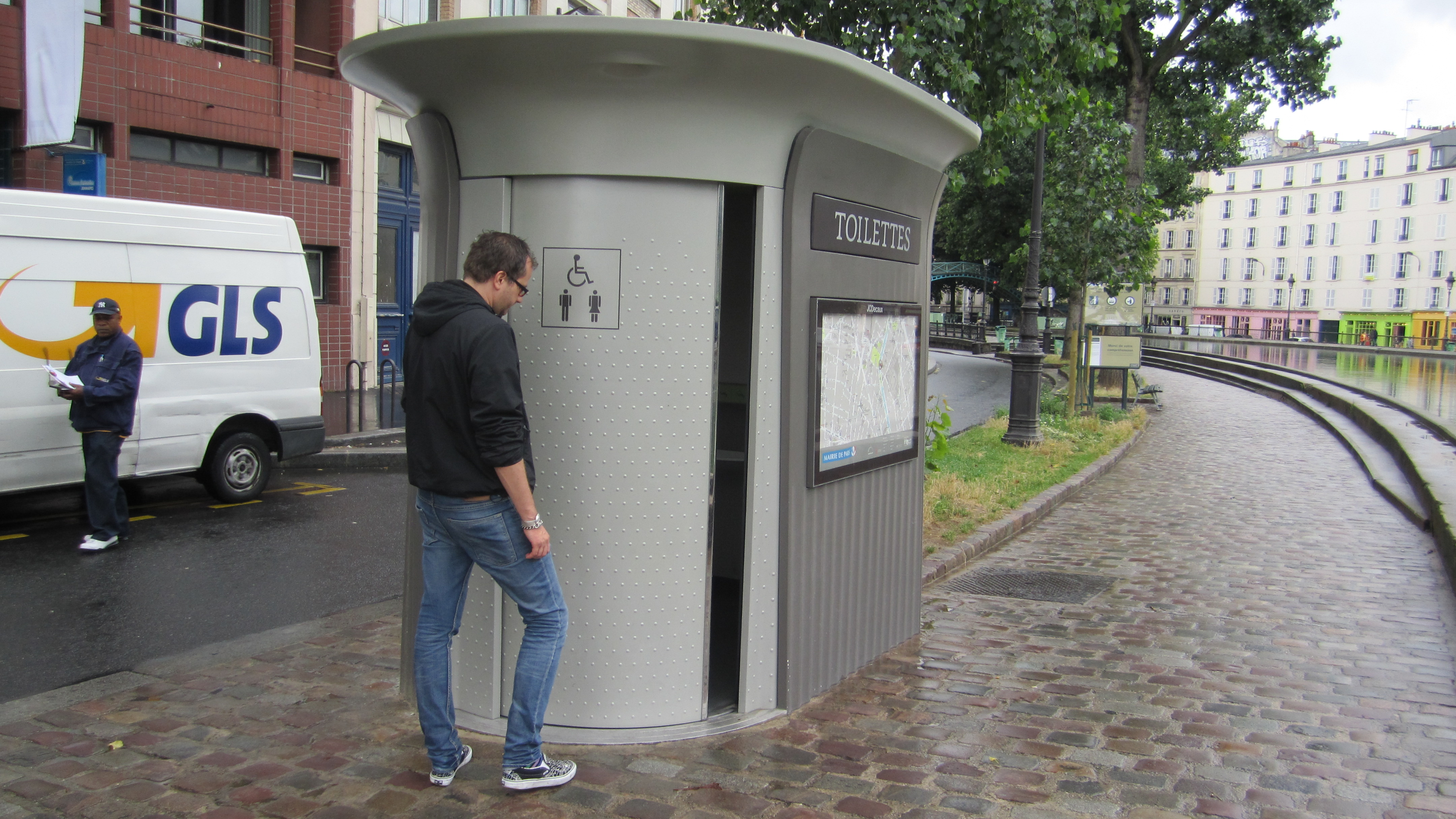 Quai de Jemmapes (Paris)